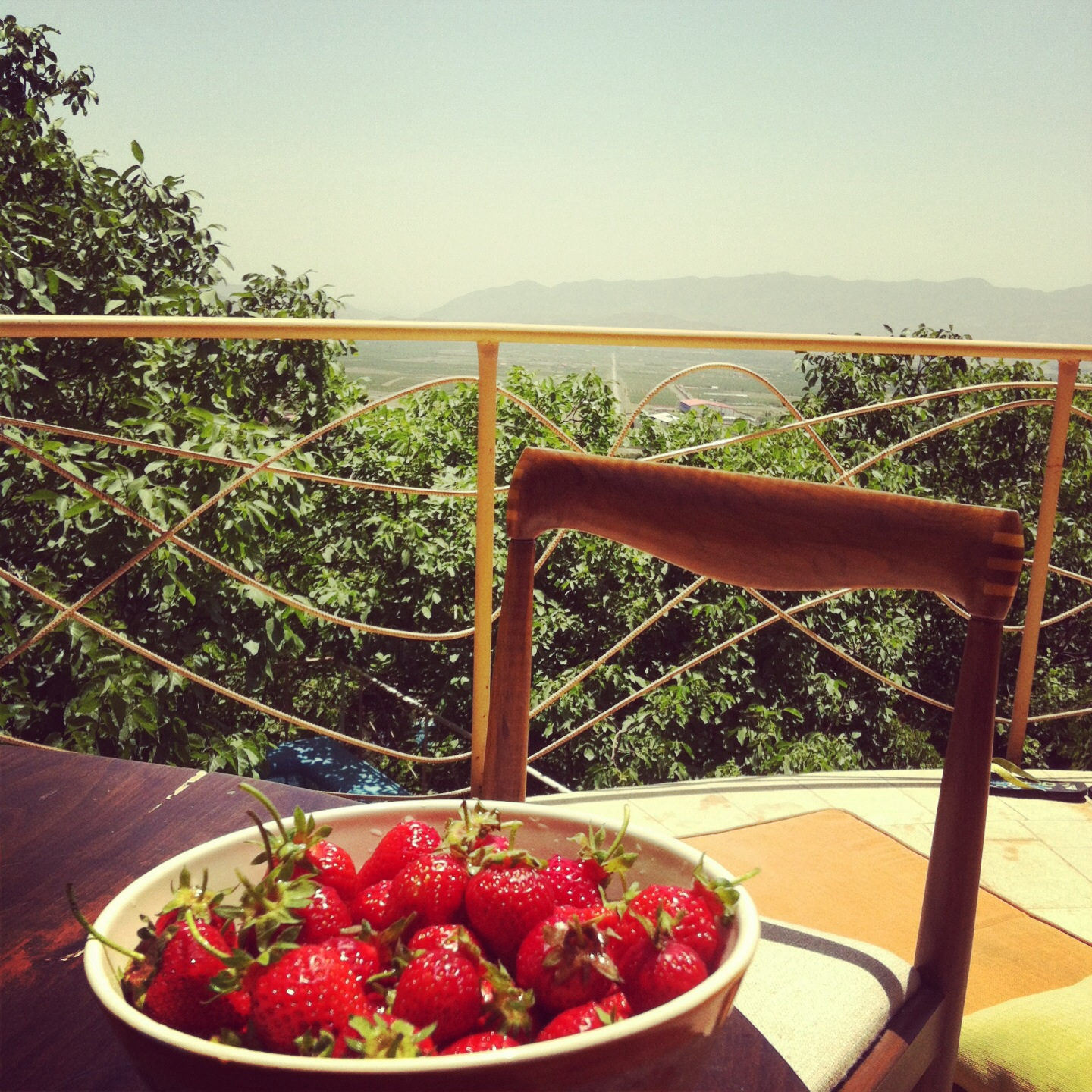 ديد مناسب روستا-تير ماه